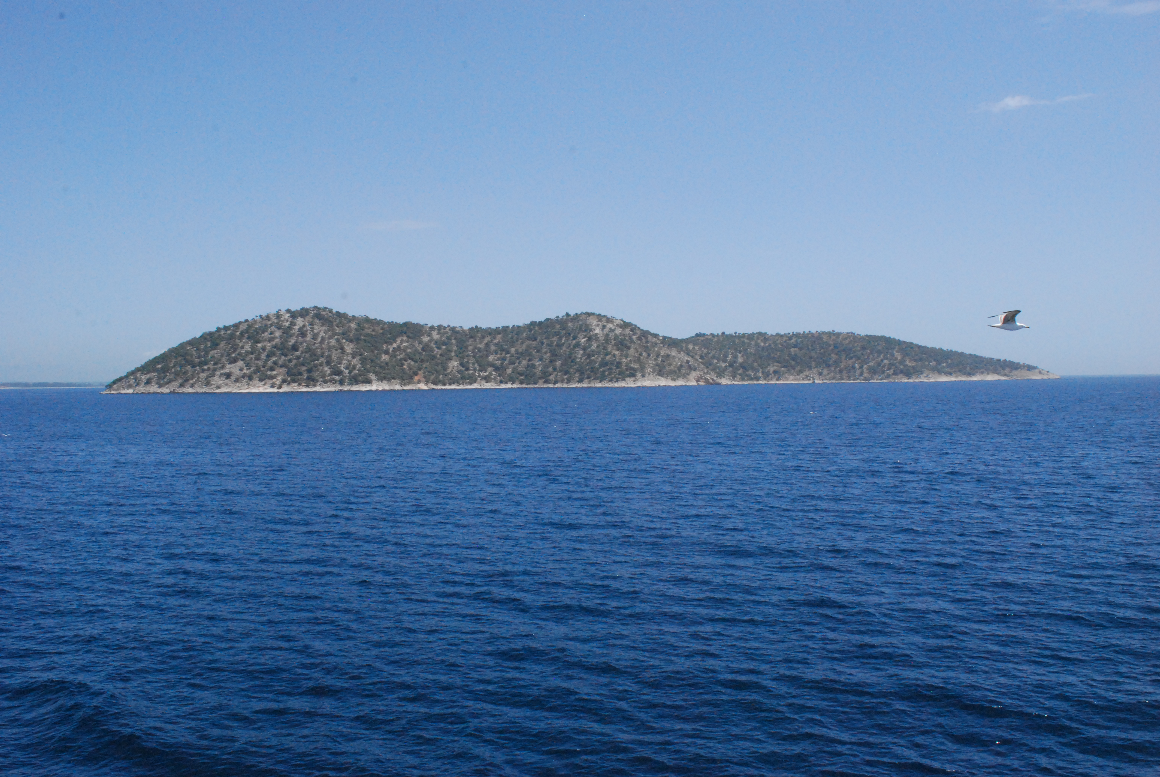 Vue de la traversée entre Keramoti et l'île de Thasos, à bord du ferry "Thassos III".